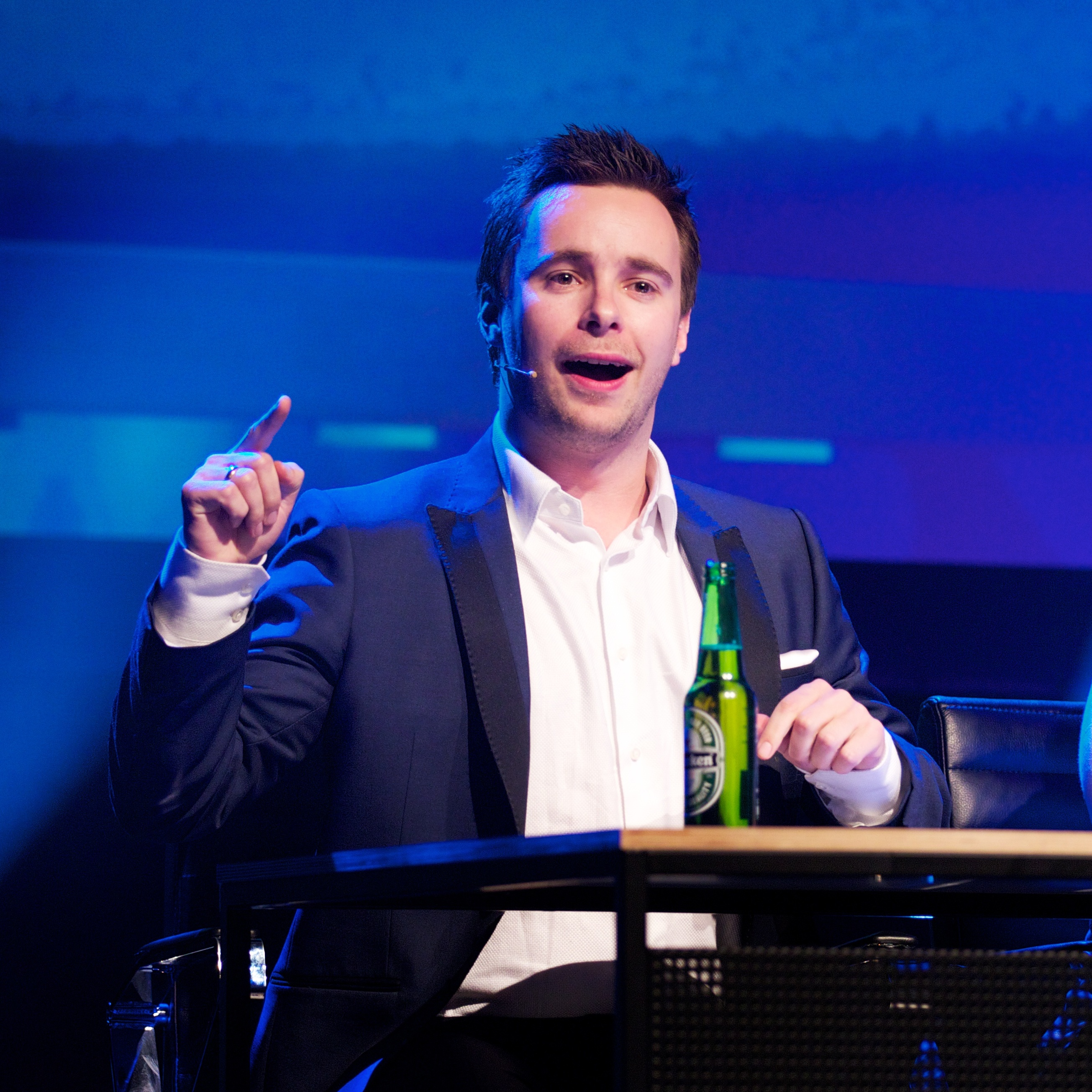 Mediequiz.